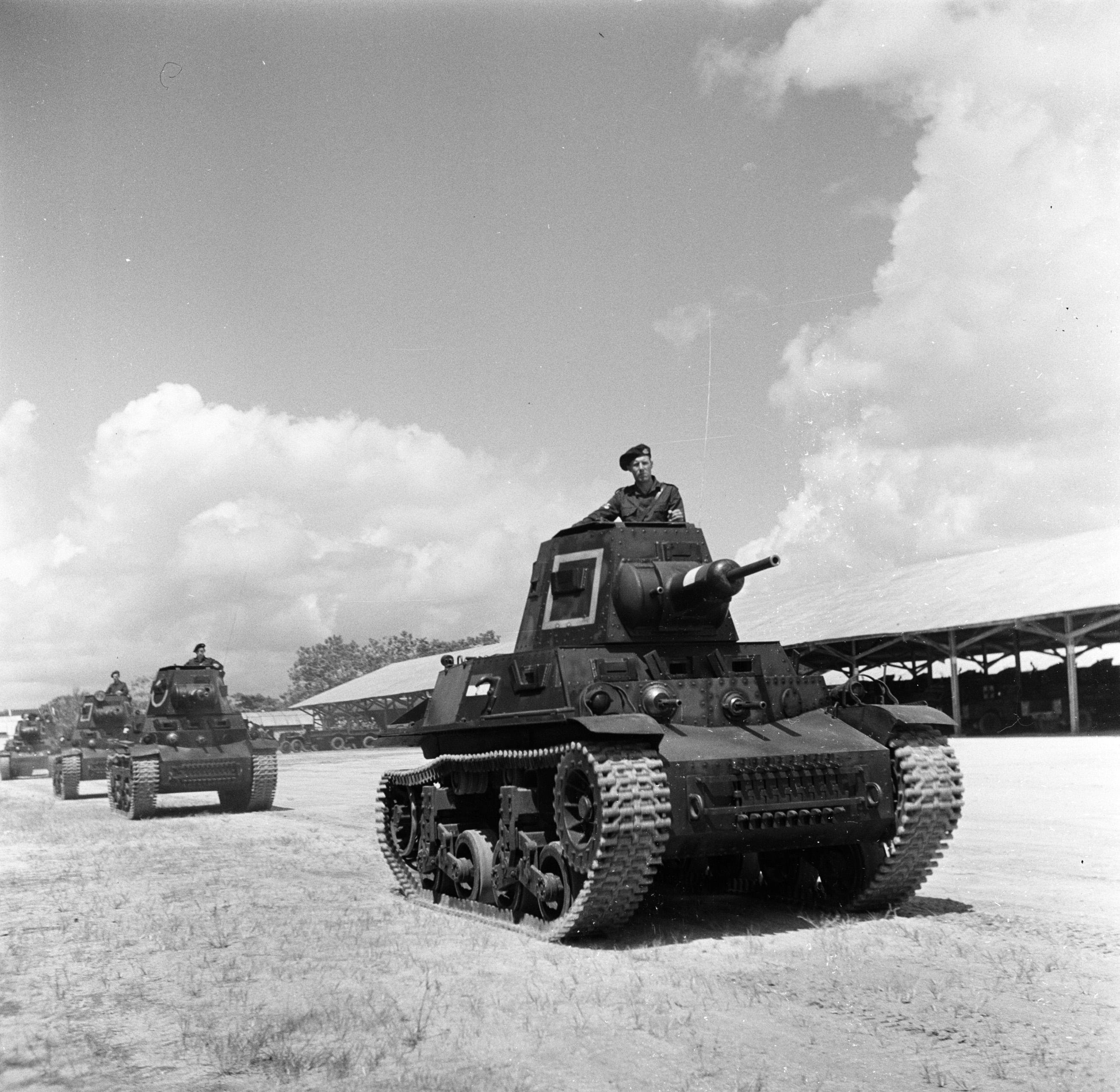 Collectie / Archief : Fotocollectie Van de Poll Reportage / Serie : Reis naar Suriname en de Nederlandse Antillen Beschrijving : Militaire voertuigen op het kazerneterrein bij een militaire parade in Paramaribo Datum : 1947 Locatie : Paramaribo, Suriname Trefwoorden : militaire parades, militaire voertuigen Fotograaf : Poll, Willem van de, [onbekend] Auteursrechthebbende : Nationaal Archief Materiaalsoort : Negatief (zwart/wit) Nummer archiefinventaris : bekijk toegang 2.24.14.02 Bestanddeelnummer : 252-6337